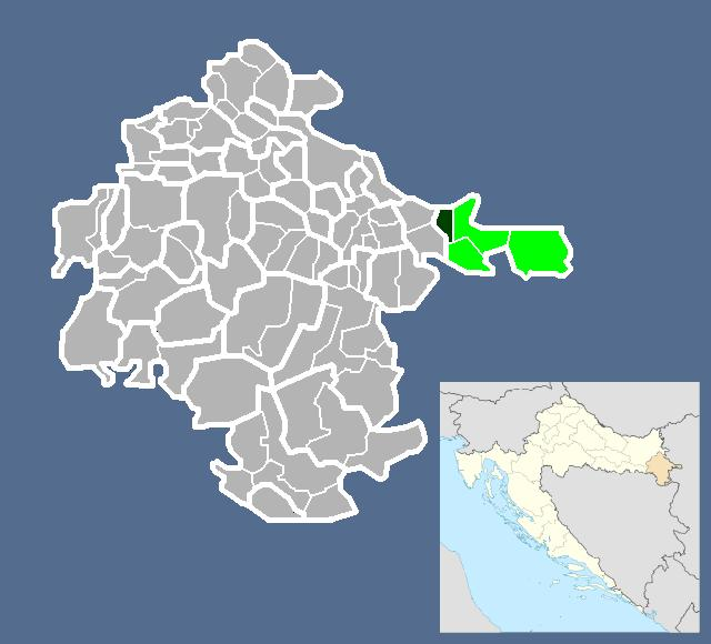 Српски (ћирилица): Вуковарско-сремска жупанија- Мохово.